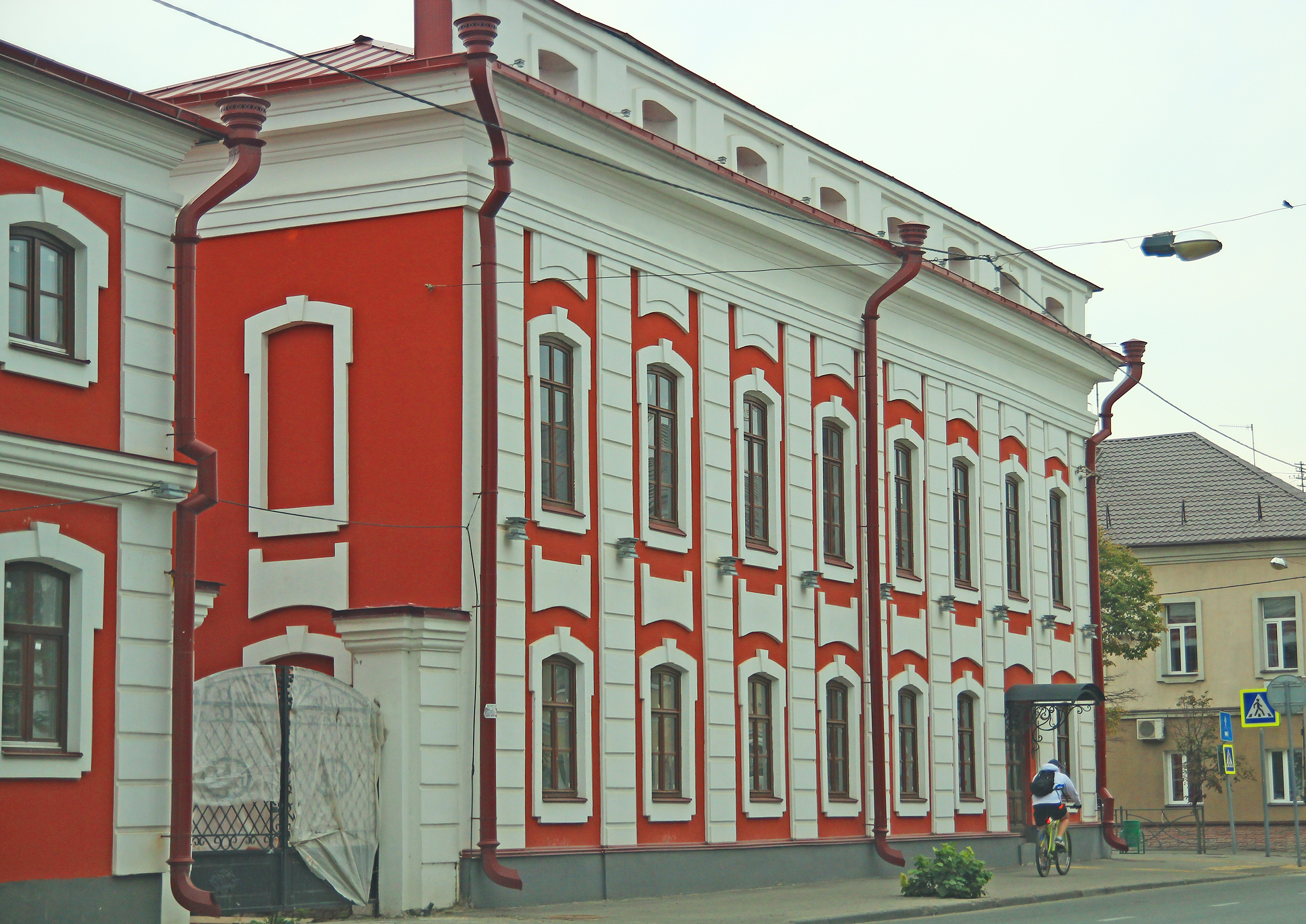 Комплекс Адмиралтейской конторы (Республика Татарстан, Казань, улица Карла Маркса, 17, Большая Красная улица, 20, Япеева улица, 6)